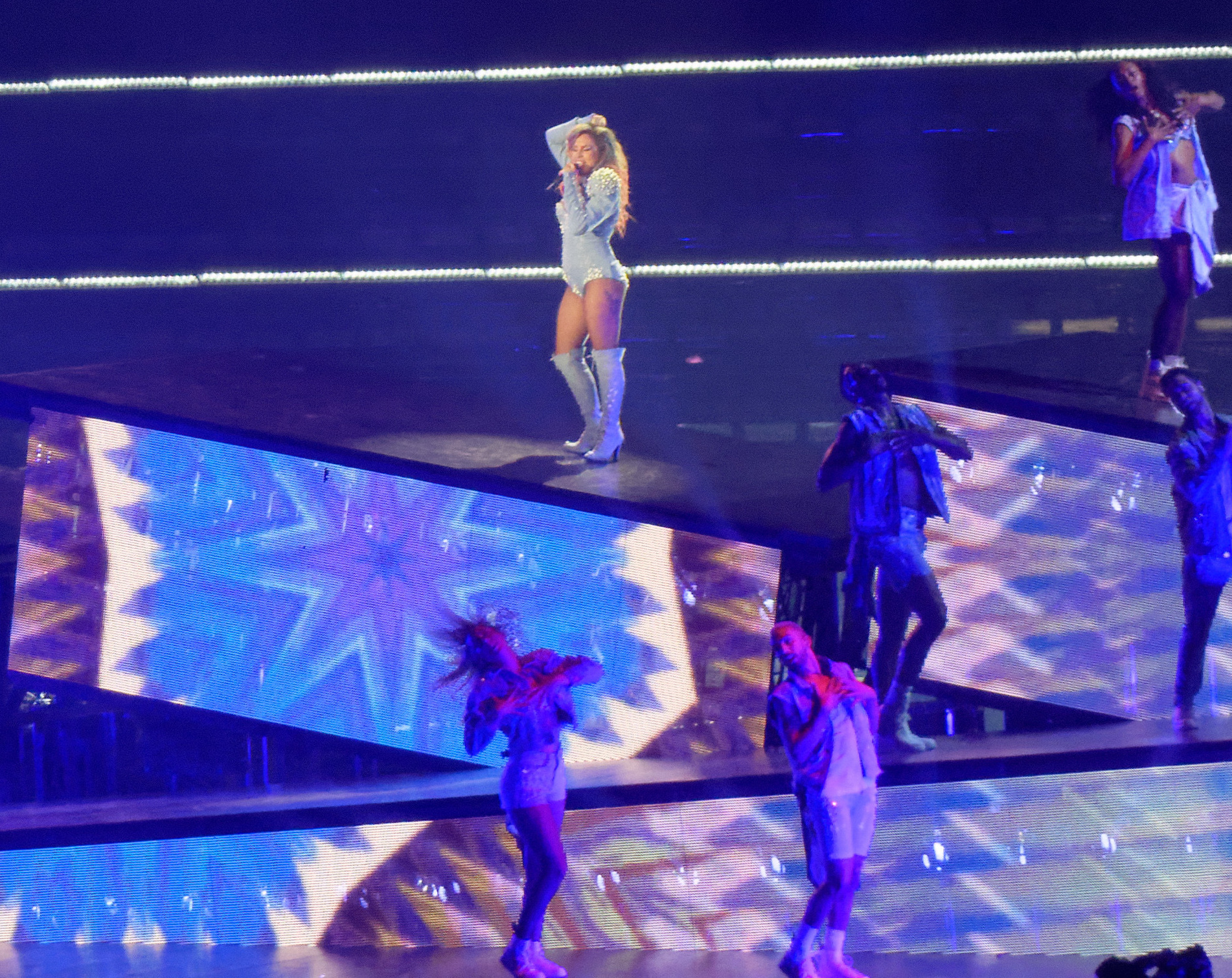 Lady Gaga performing "Telephone" at the Joanne World Tour in Tacoma